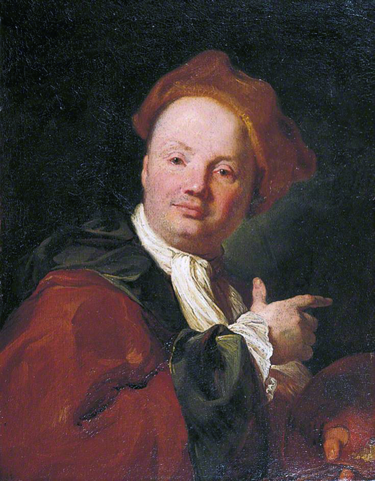 Self-portrait